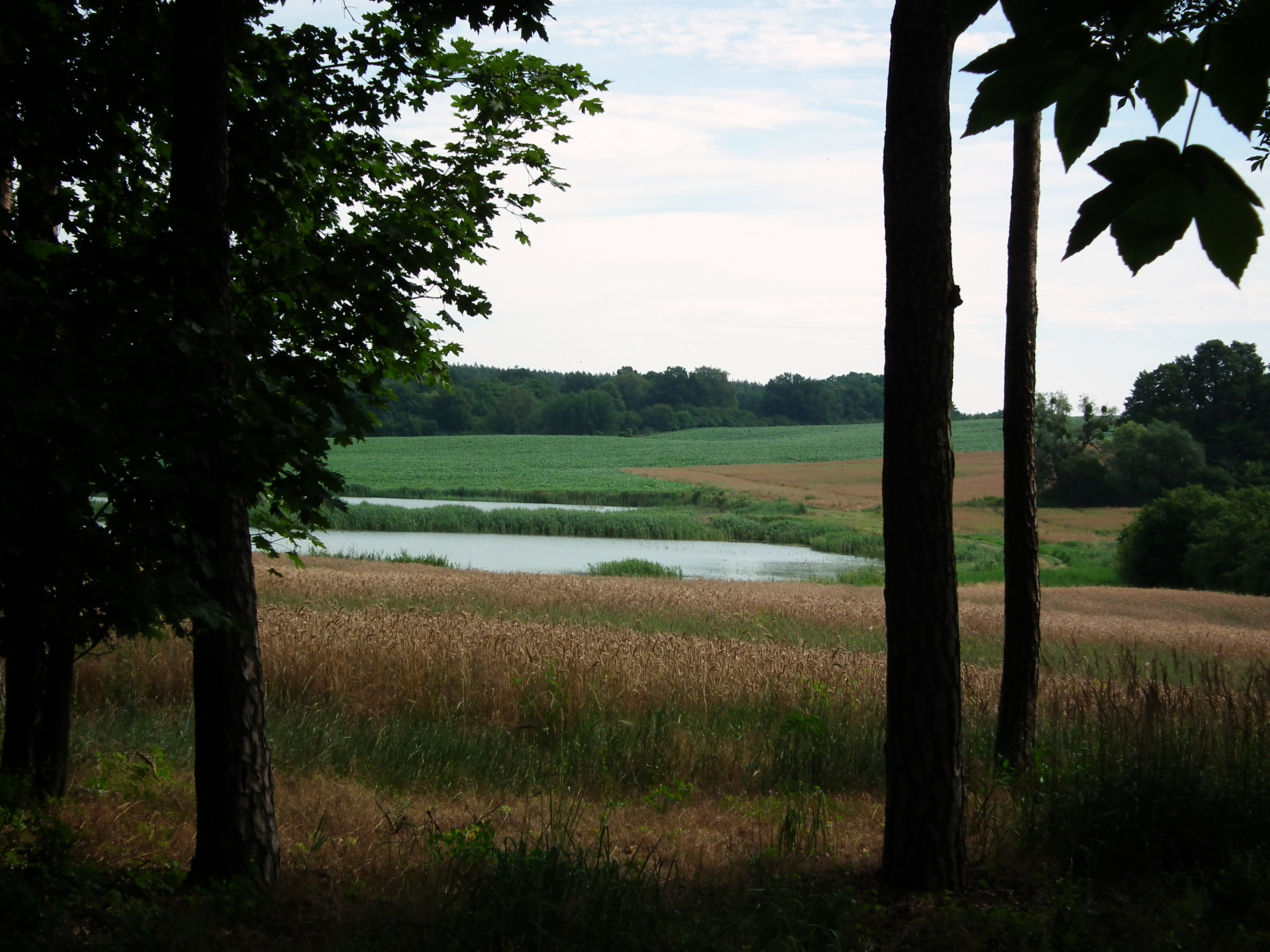 Mościejewo - krajobraz okolic.